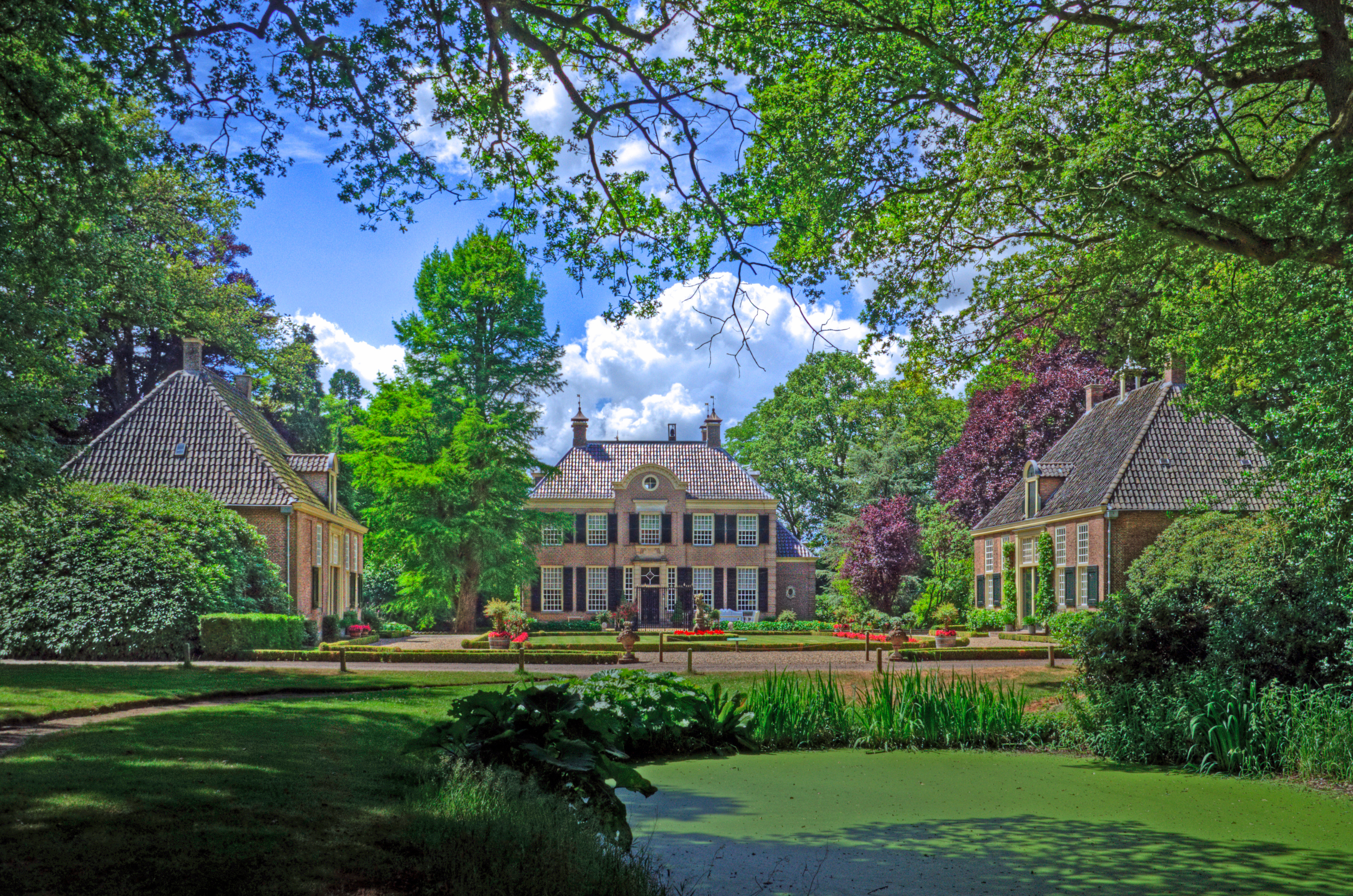 Den Aalshorst ligt vlakbij Hoonhorst, in de buurt van Dalfsen. Dit prachtige landhuis is in 1644 gebouwd en in 1720 gewijzigd. Sinds lang behoort het tot de bezittingen van het geslacht Van Dedem. Hoewel Den Aalshorst door de gracht om het huis en de bouwhuizen aan weerszijden van het voorplein het karakter heeft van een oude havezate is het nooit als zodanig beschouwd. De bekende 19e eeuwse schilder Louis Rhijnvis Feith heeft er lange tijd gewoond. Het Engels Werk, een naar Engels model aangelegd park, behoort ook tot dit landgoed.